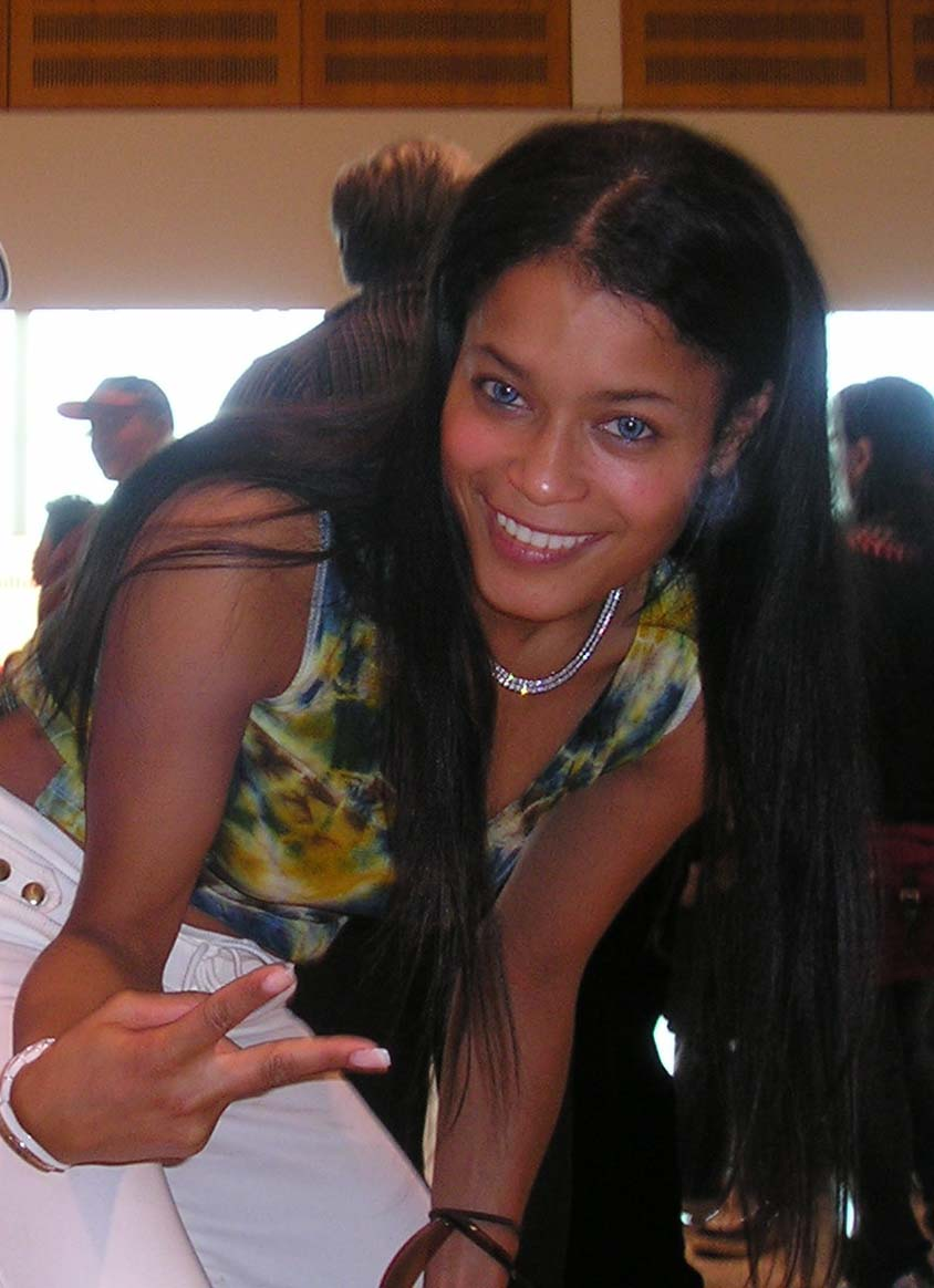 Singer